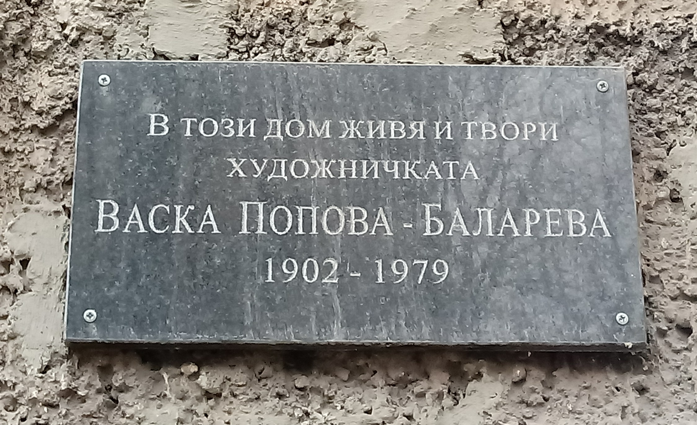 Vaska Popova-Balareva memorial plaque, 32 Patriarch Evtimiy Blvd., Sofia